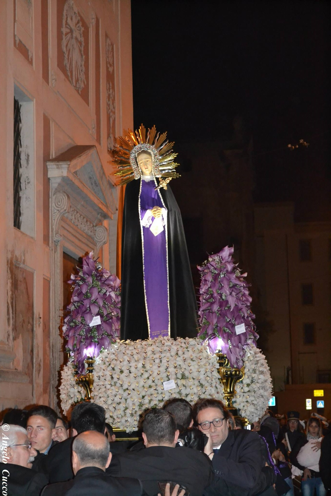 Maria SS.Addolorata in processione nel giorno del Venerdi Santo